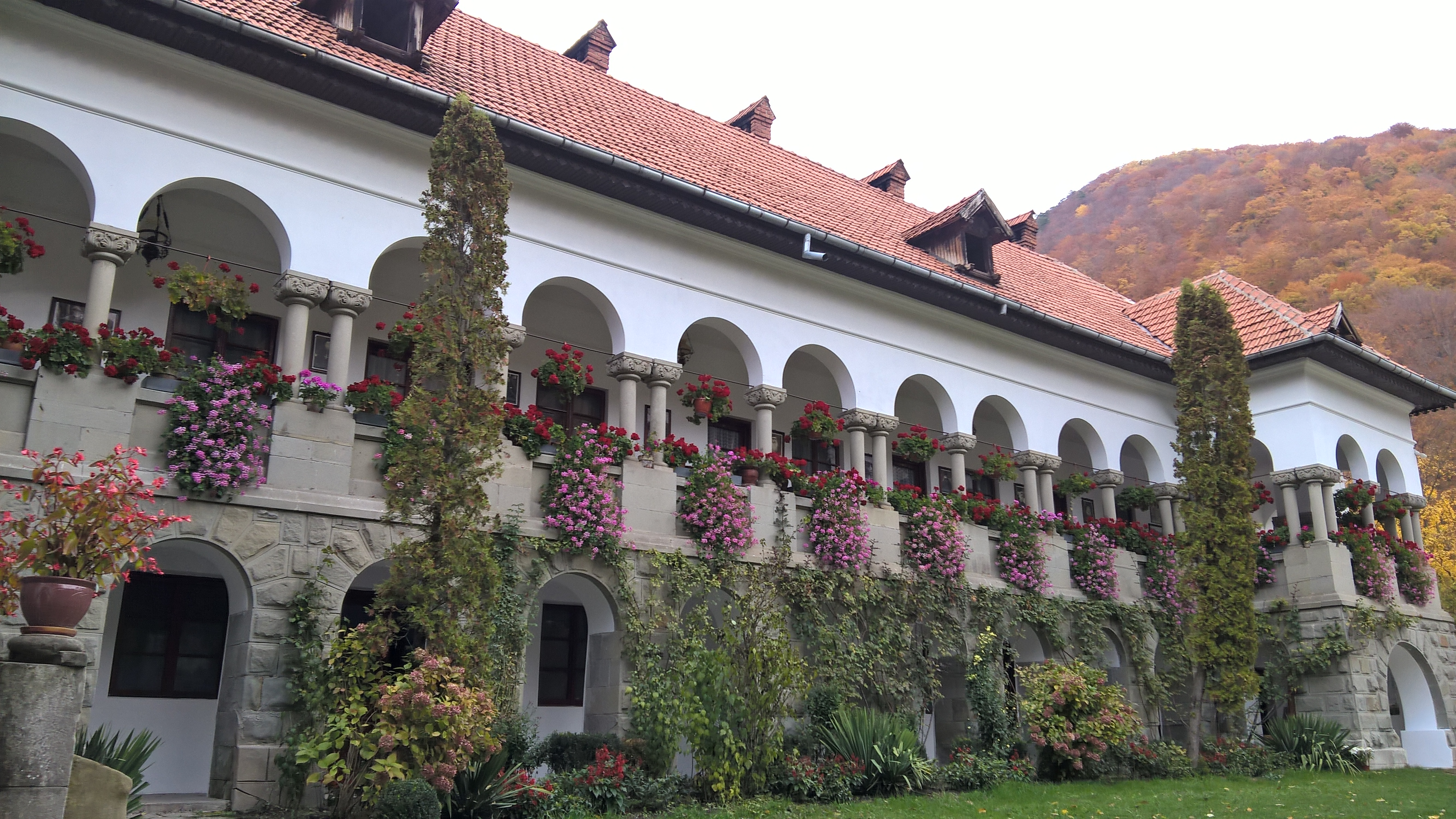 Mănăstirea Turnu, Clădiri - anexe 04